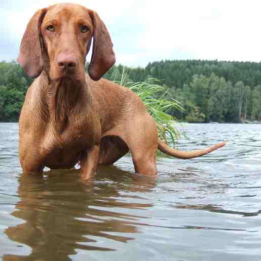 Cedra z Blanenských lesů